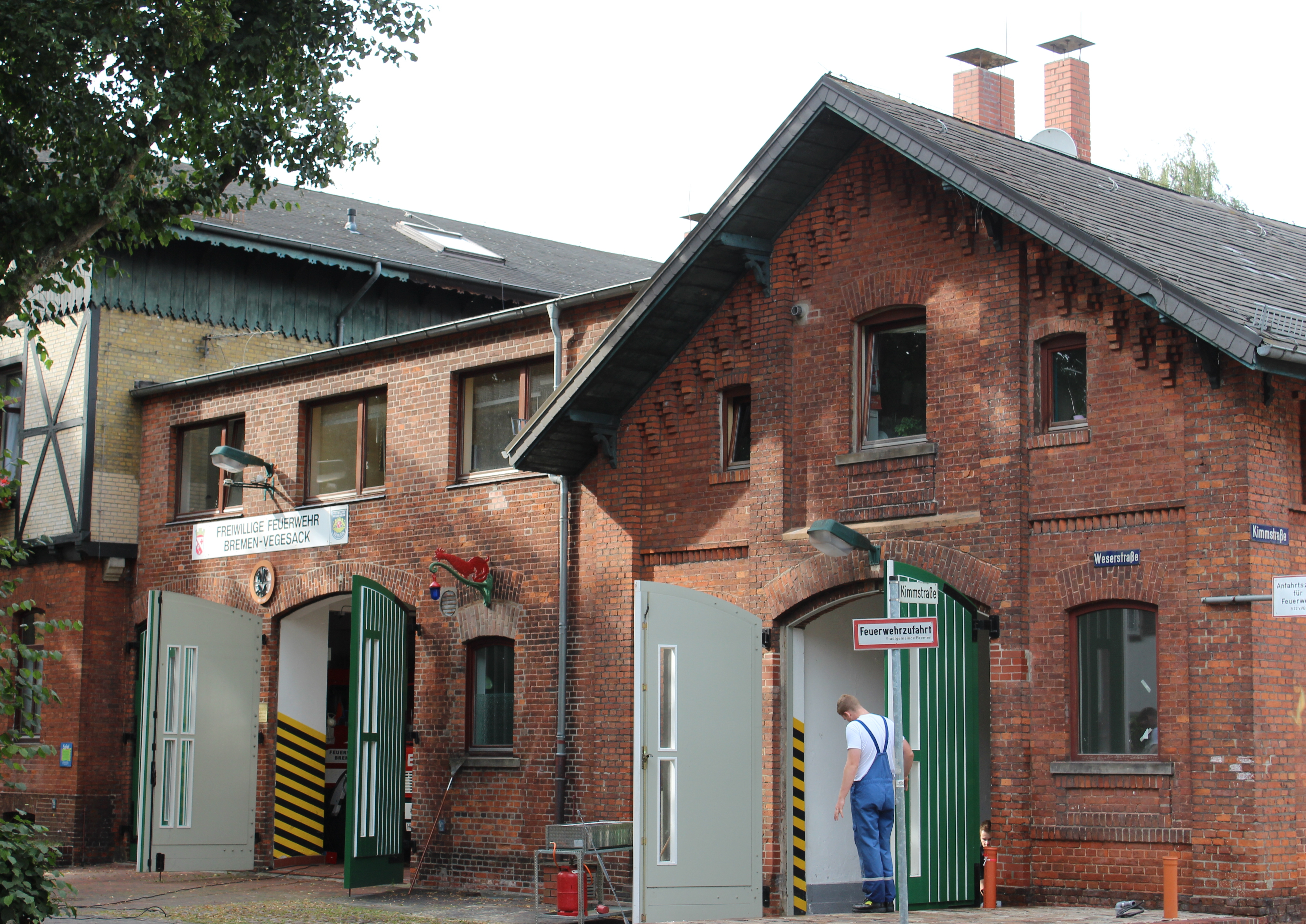 Freiwillige Feuerwehr Bremen-Vegesack. Die Remise der Villa Fritze ist ein geschütztes Kulturdenkmal in der Freien Hansestadt Bremen, mit der Nr. 1859 beim Landesamt für Denkmalpflege registriert.